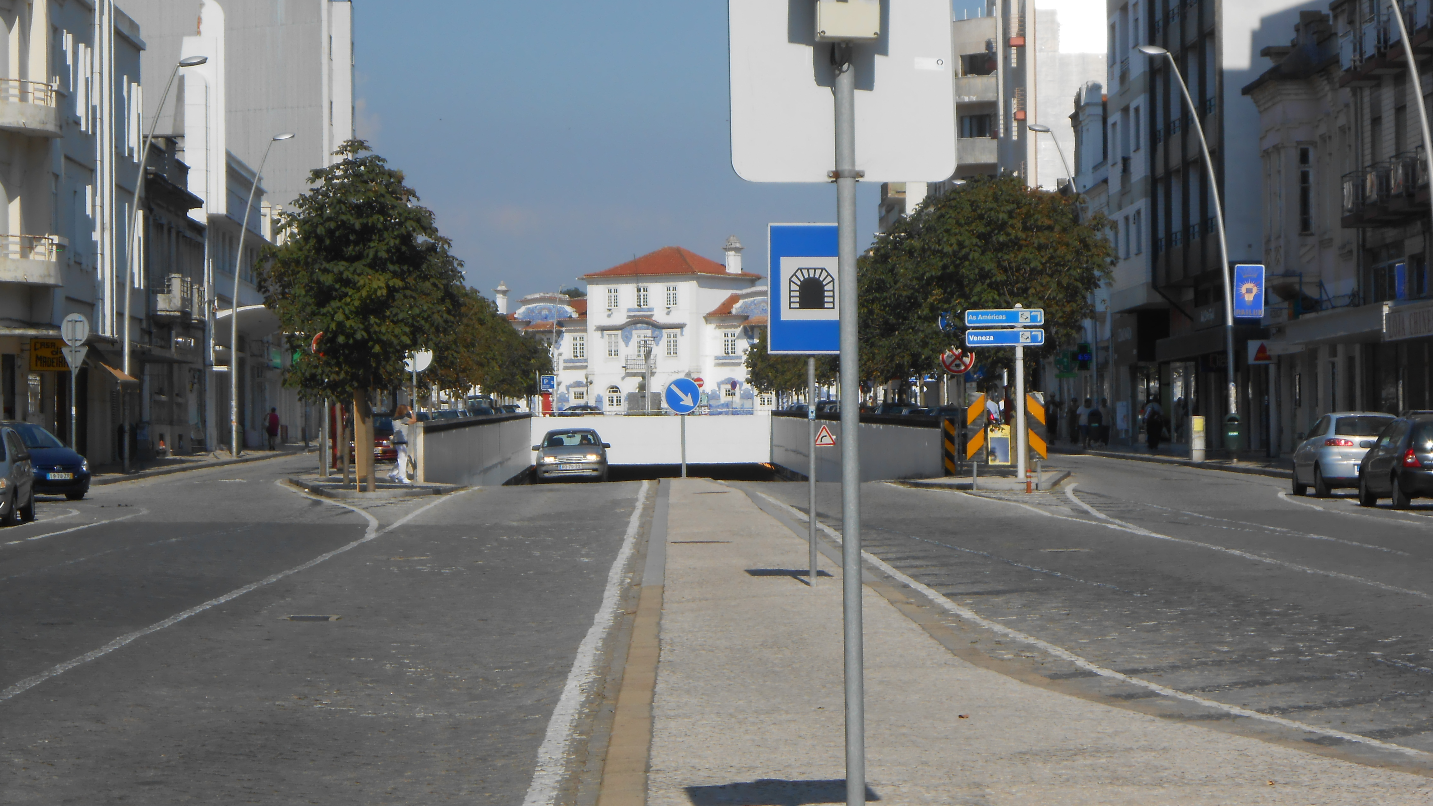 A Avenida Dr. Lourenço Peixinho liga a estação de Aveiro ao centro da cidade.